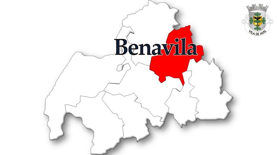 Evolução da População